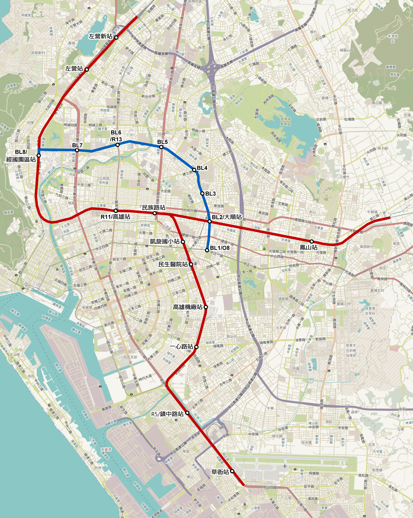 1996年高雄鐵路地下化方案出來後的台鐵地下化區間、藍線截短版本